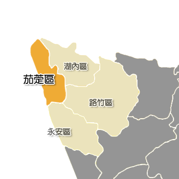 茄萣區相對位置